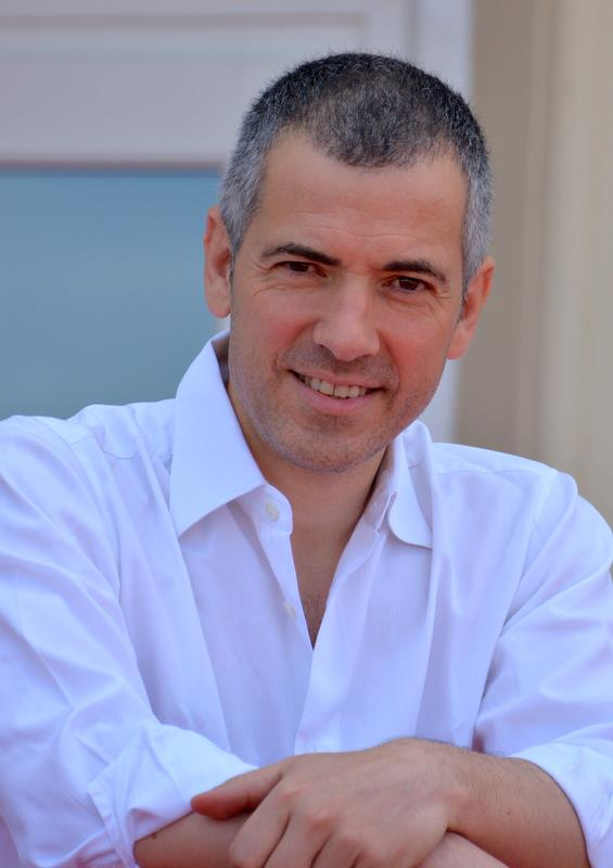 Bruno Putzulu au festival du film de Cabourg